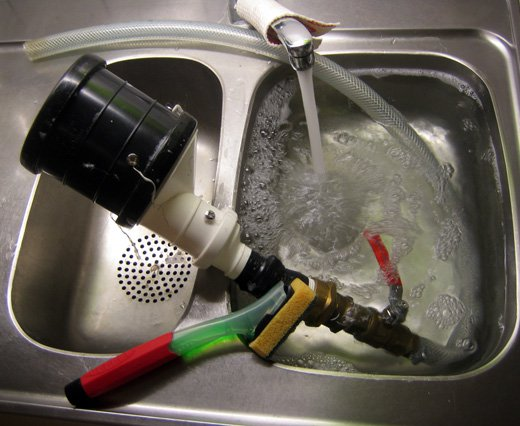 Bild på Ölbong som skall diskas.